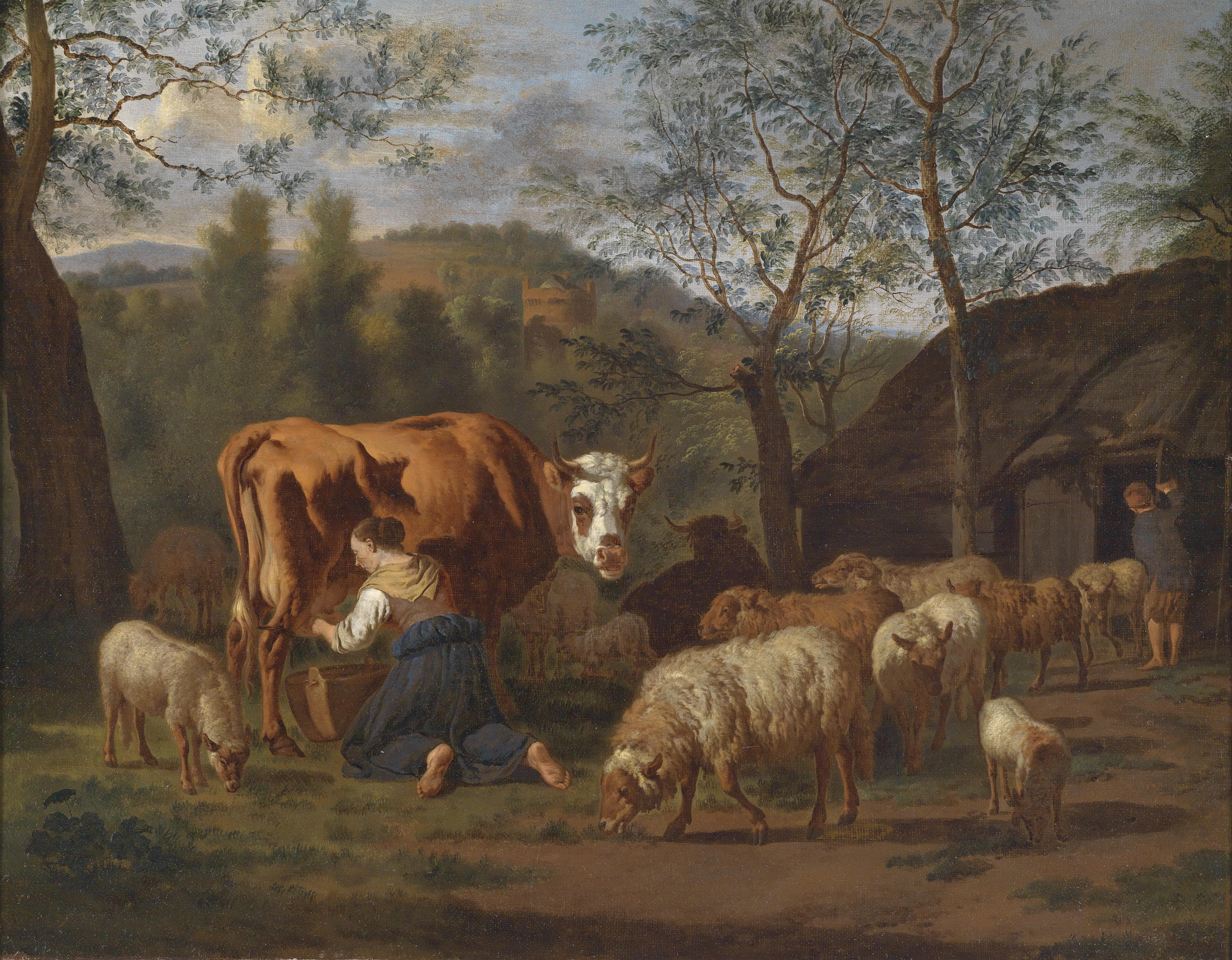 Eine melkende Magd mit Kuh und Ziegen vor dem Stalltitle QS:P1476,de:"Eine melkende Magd mit Kuh und Ziegen vor dem Stall" label QS:Lde,"Eine melkende Magd mit Kuh und Ziegen vor dem Stall"